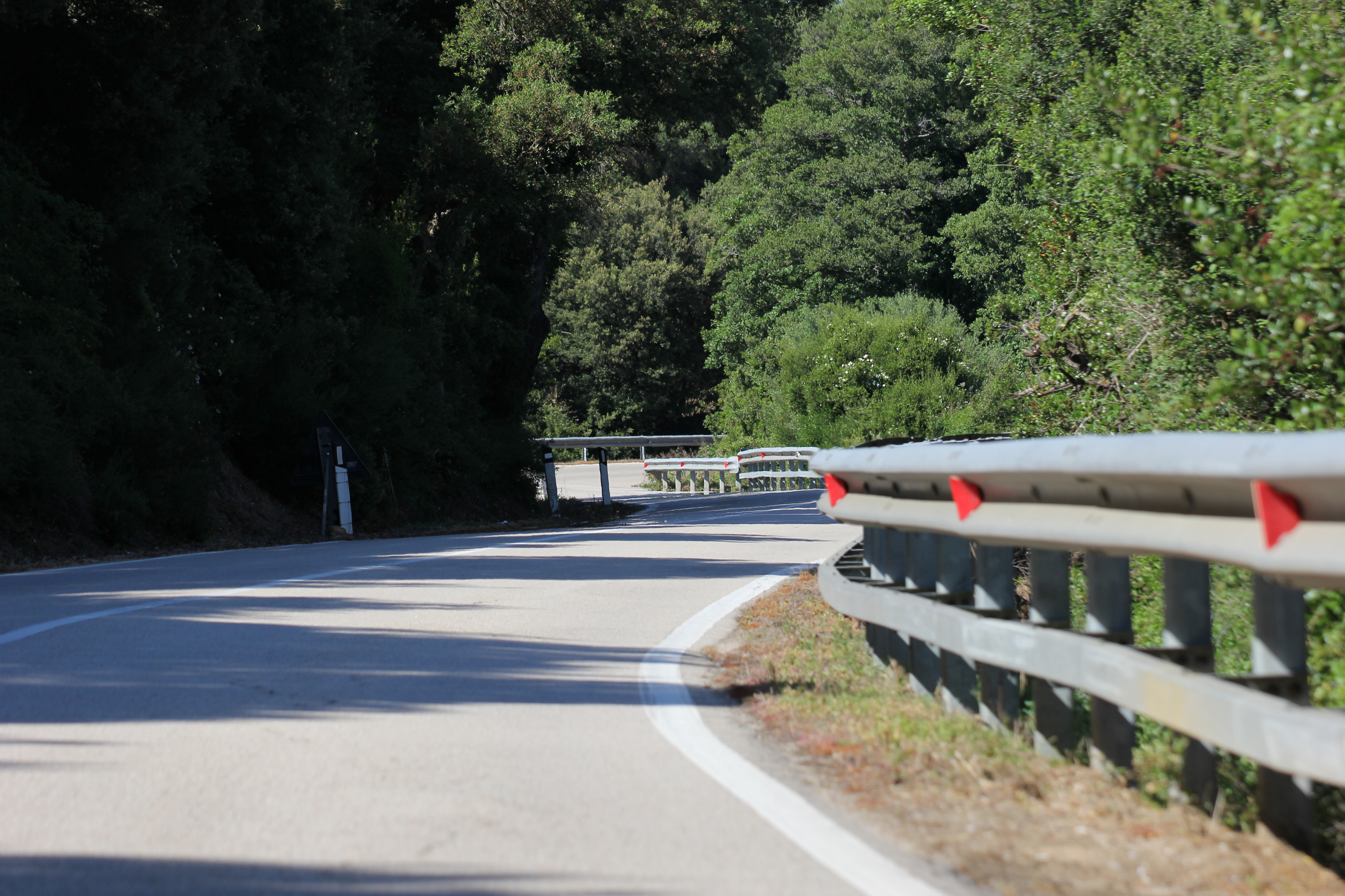 Tempio Pausania - SS 133